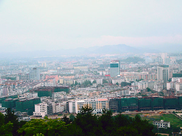 在袁山公园看宜春